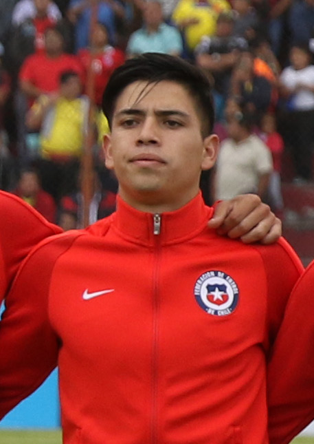 Ambato, Ecuador, 22 enero 2017 (Andes).- Ecuador igualó 1-1 este domingo con Chile en la ciudad de Ambato y dejó vivas las posibilidades de clasificar a la fase final del Campeonato Sudamericano Sub 20 del que es anfitrión, y se alista desde ya para jugar con Paraguay en la última jornada, el jueves próximo, en la ciudad ecuatoriana de Ríobamba. ANDES/Micaela Ayala V.